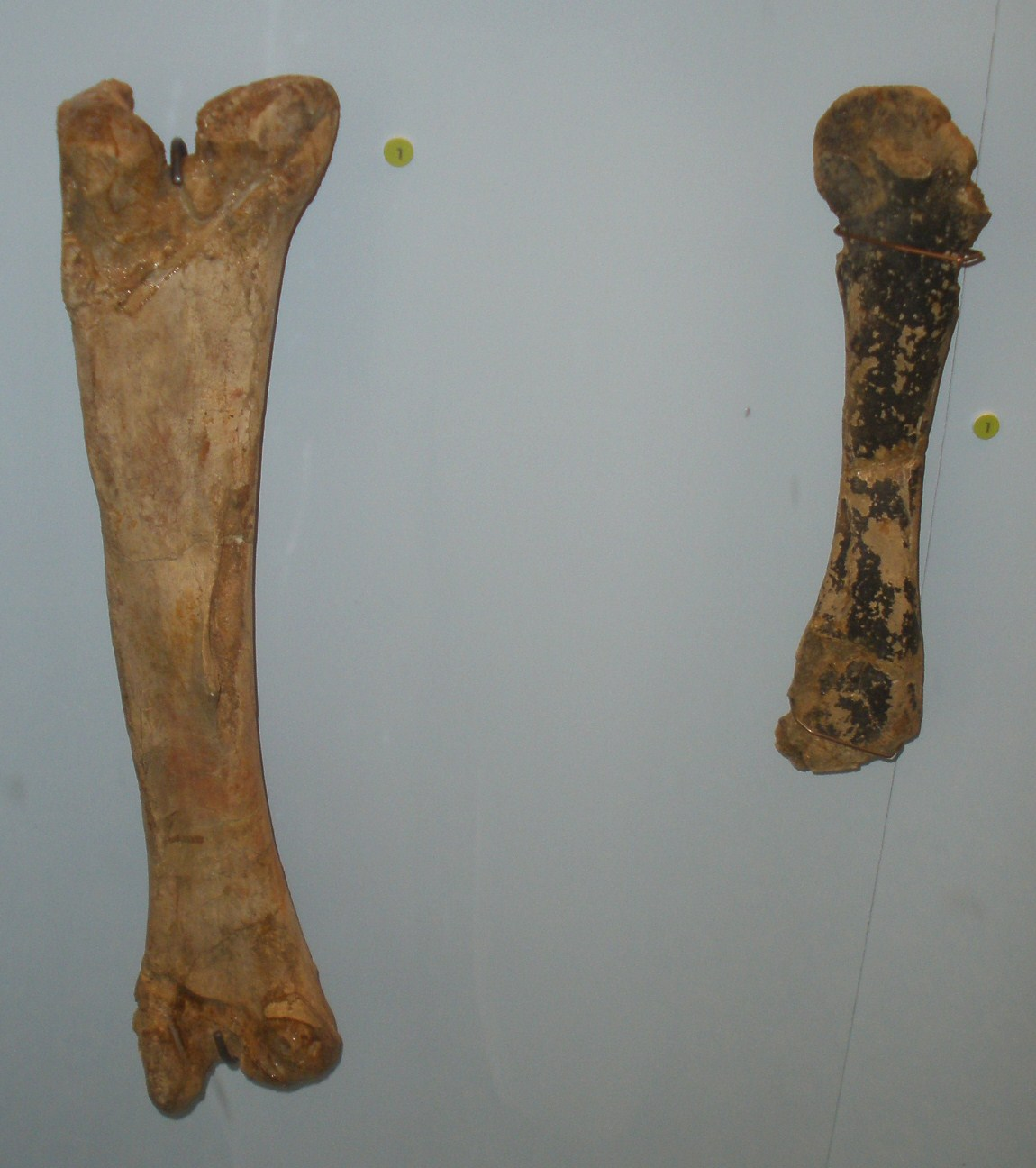 Fossil of Orthomerus, an ornithopod dinosaur Took the photo at Musee d'Histoire Naturelle, Brussels